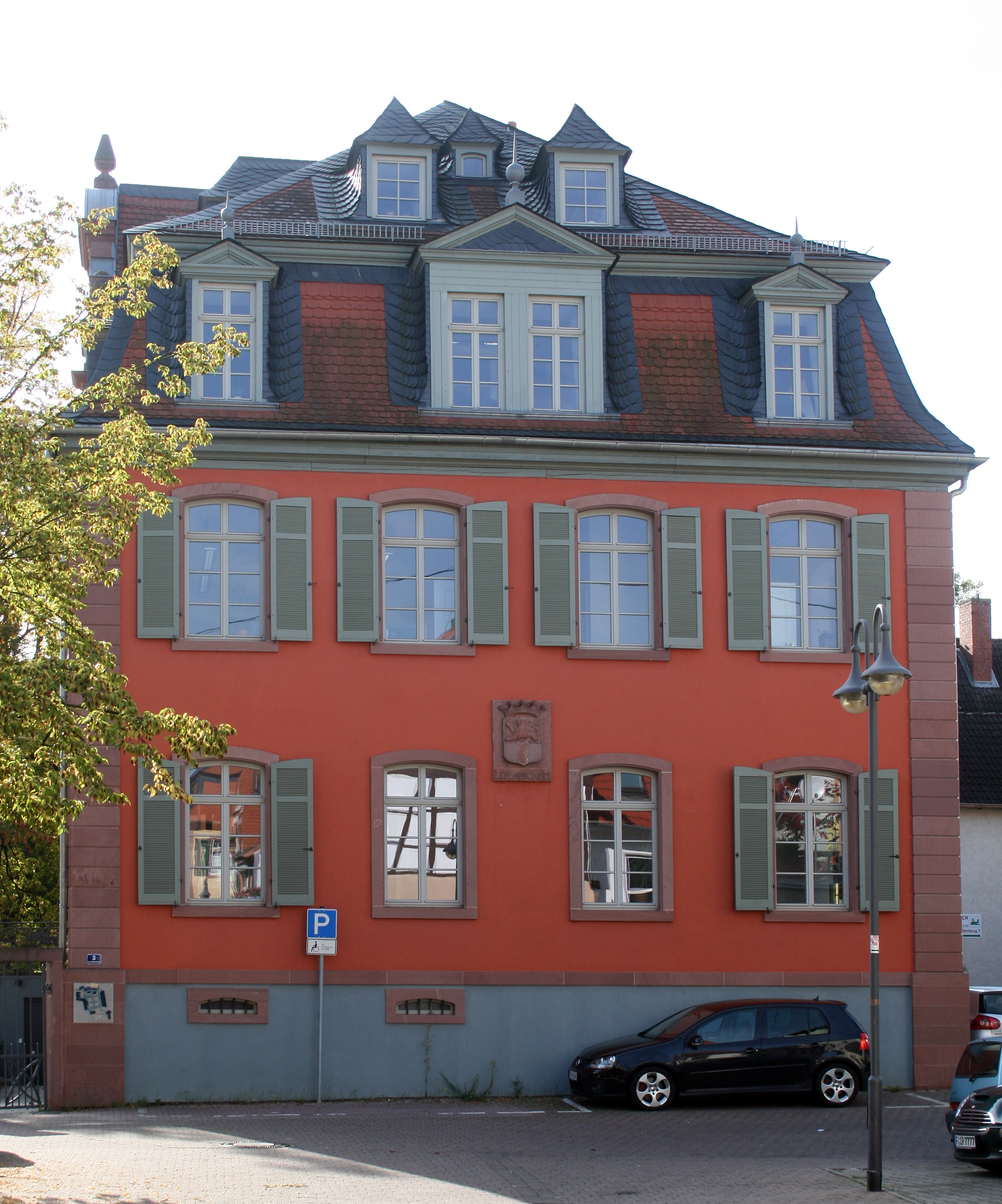 Lersnersches Schloss in Nieder-Erlenbach, einem Stadtteil von Frankfurt. Barockes Herrenhaus, erbaut 1768.